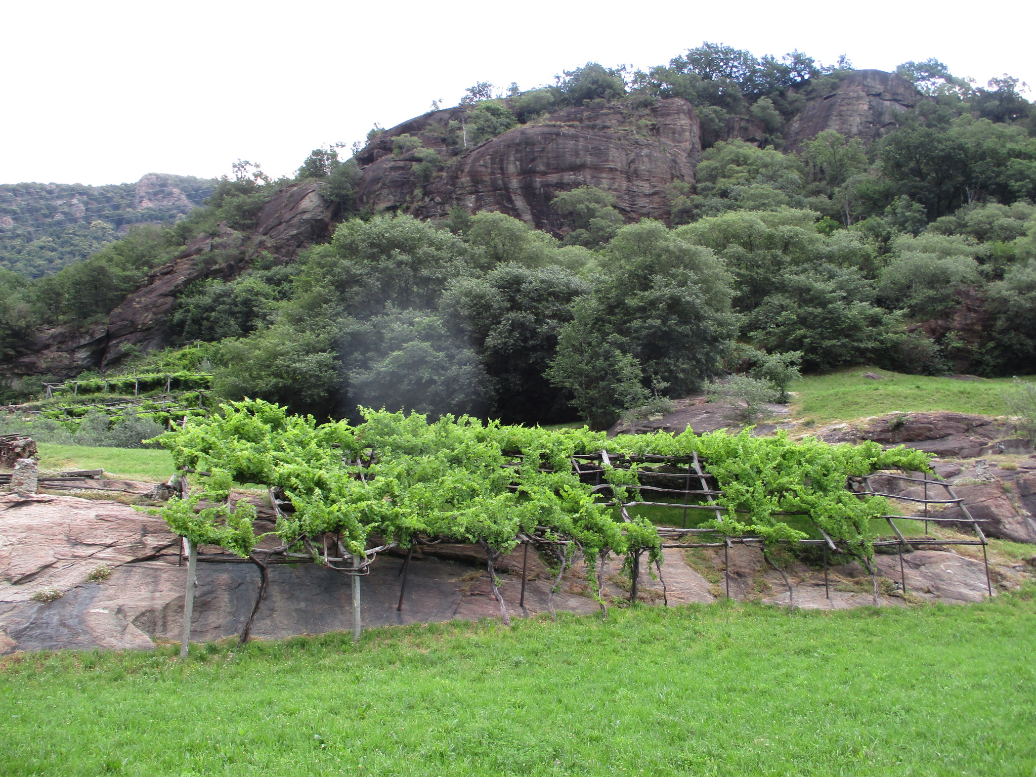 Vineyards in Aosta Valley